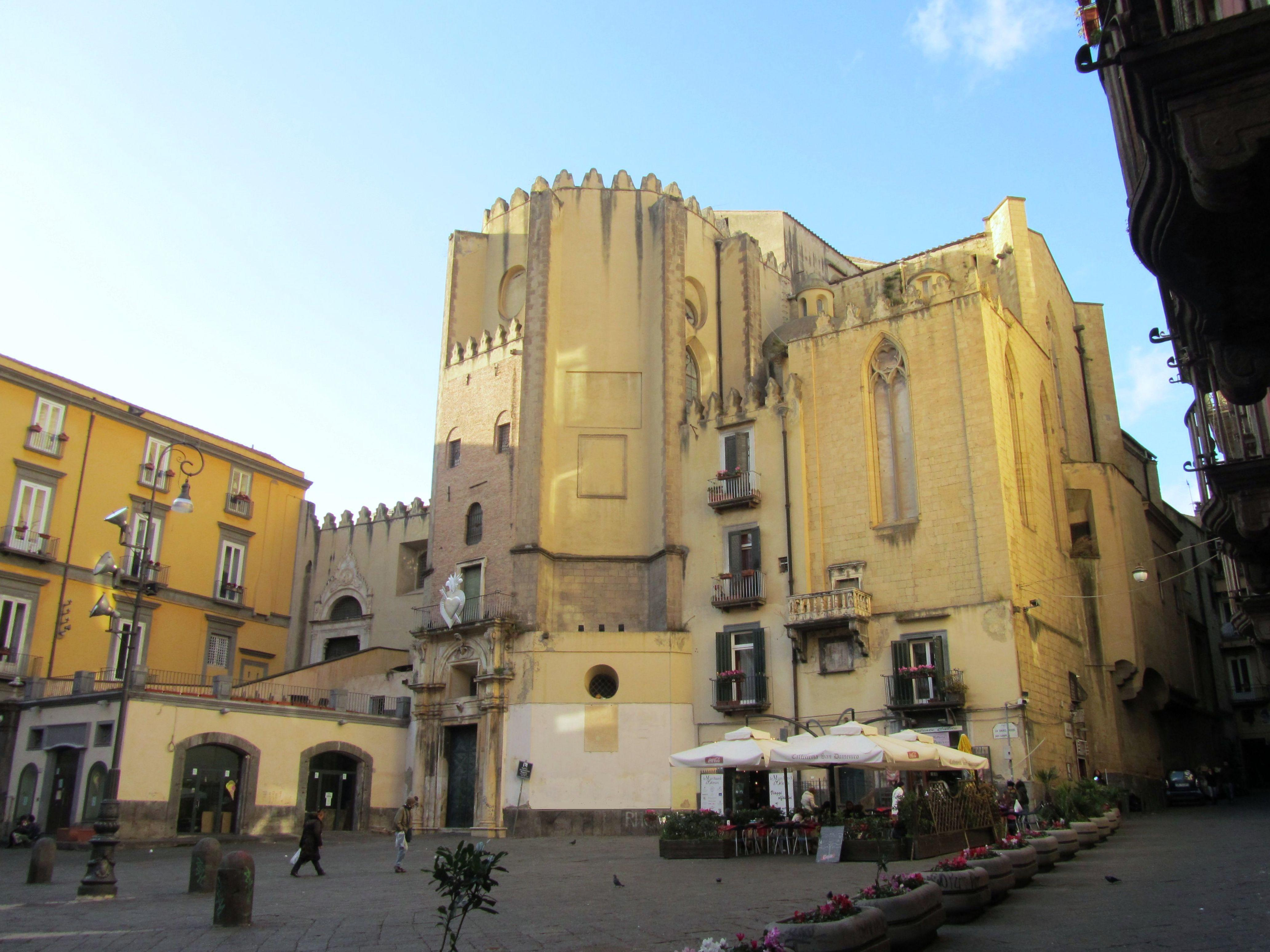 Chiesa di San Domenico Maggiore (Napoli)